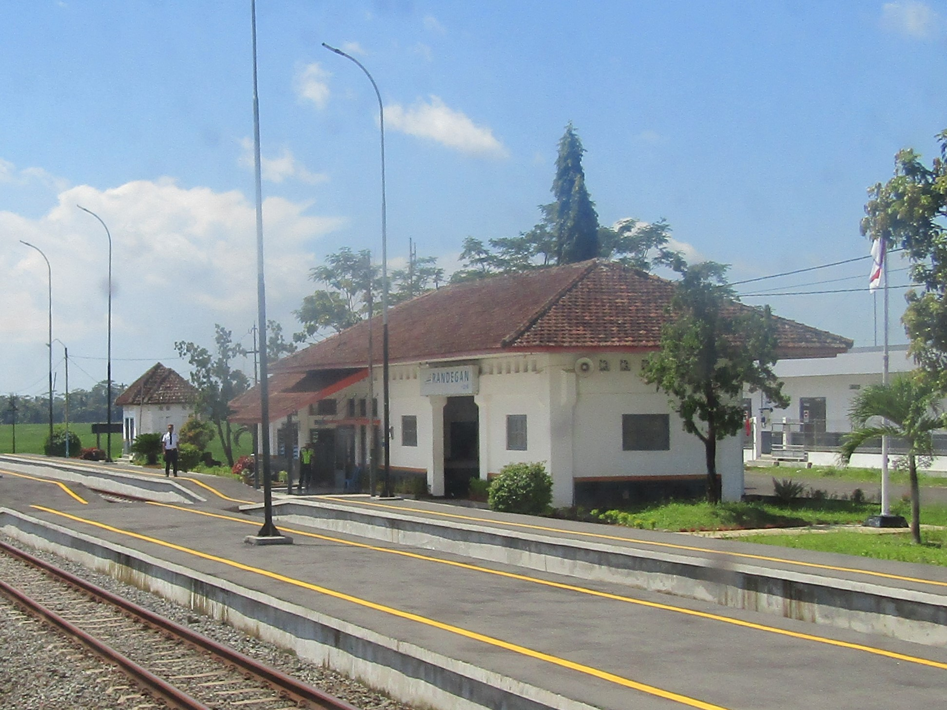 Tampak peron bangunan Stasiun Randegan, 2019, dengan PPKA tunjuk-sebut Semboyan 1.